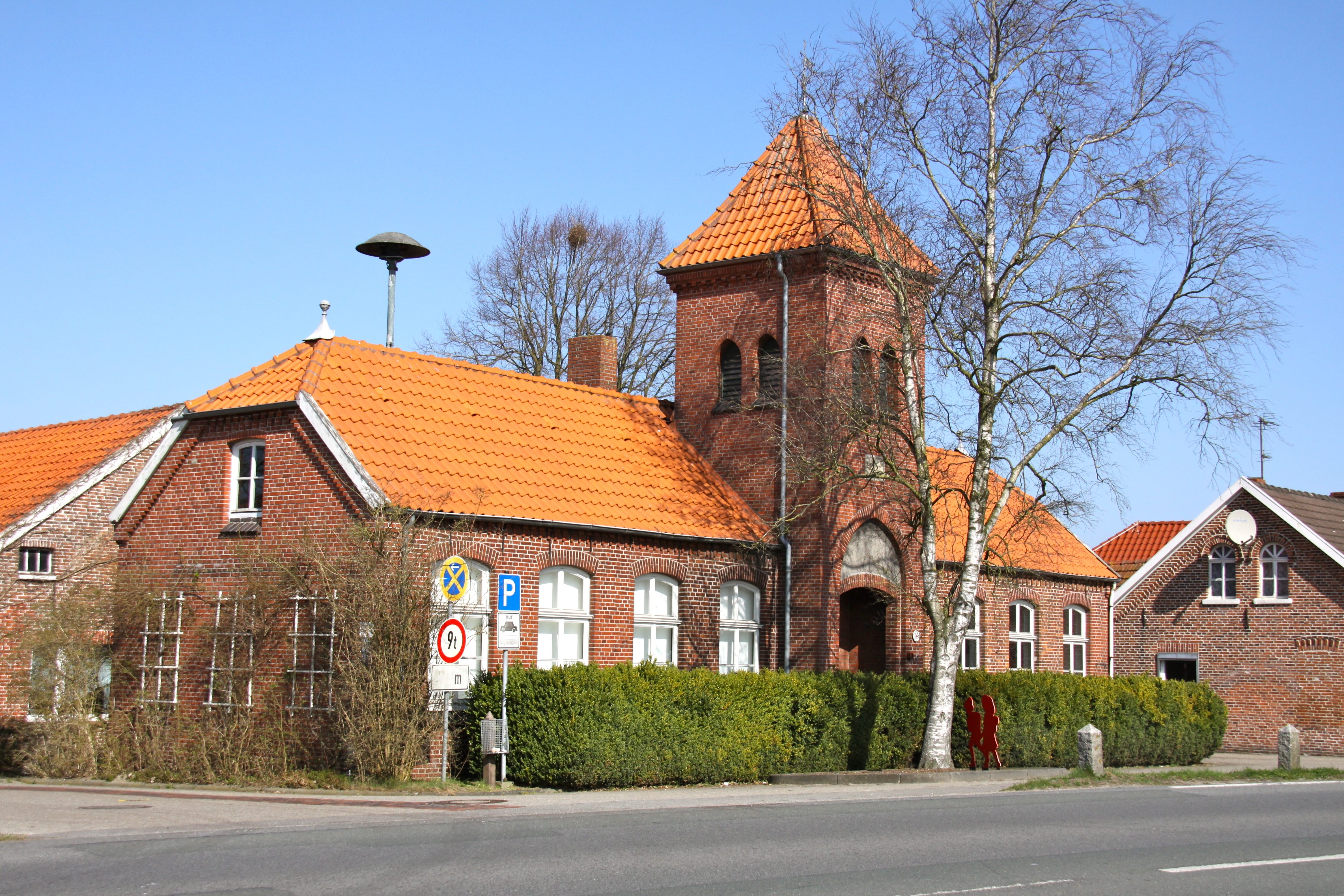 Schulmuseum Folmhusen